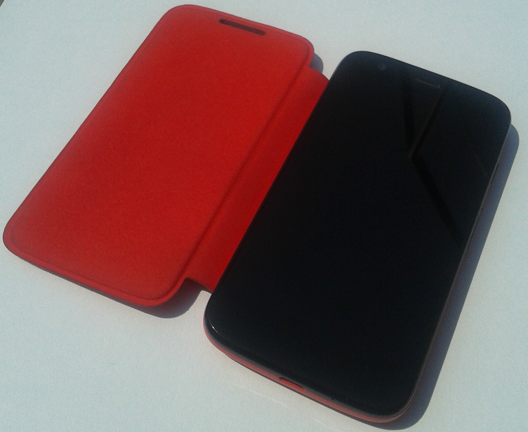 Moto G XT1032 8GB